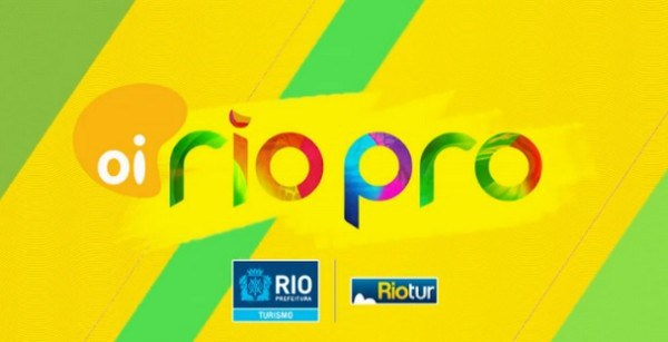 Logo Oi Rio Pro